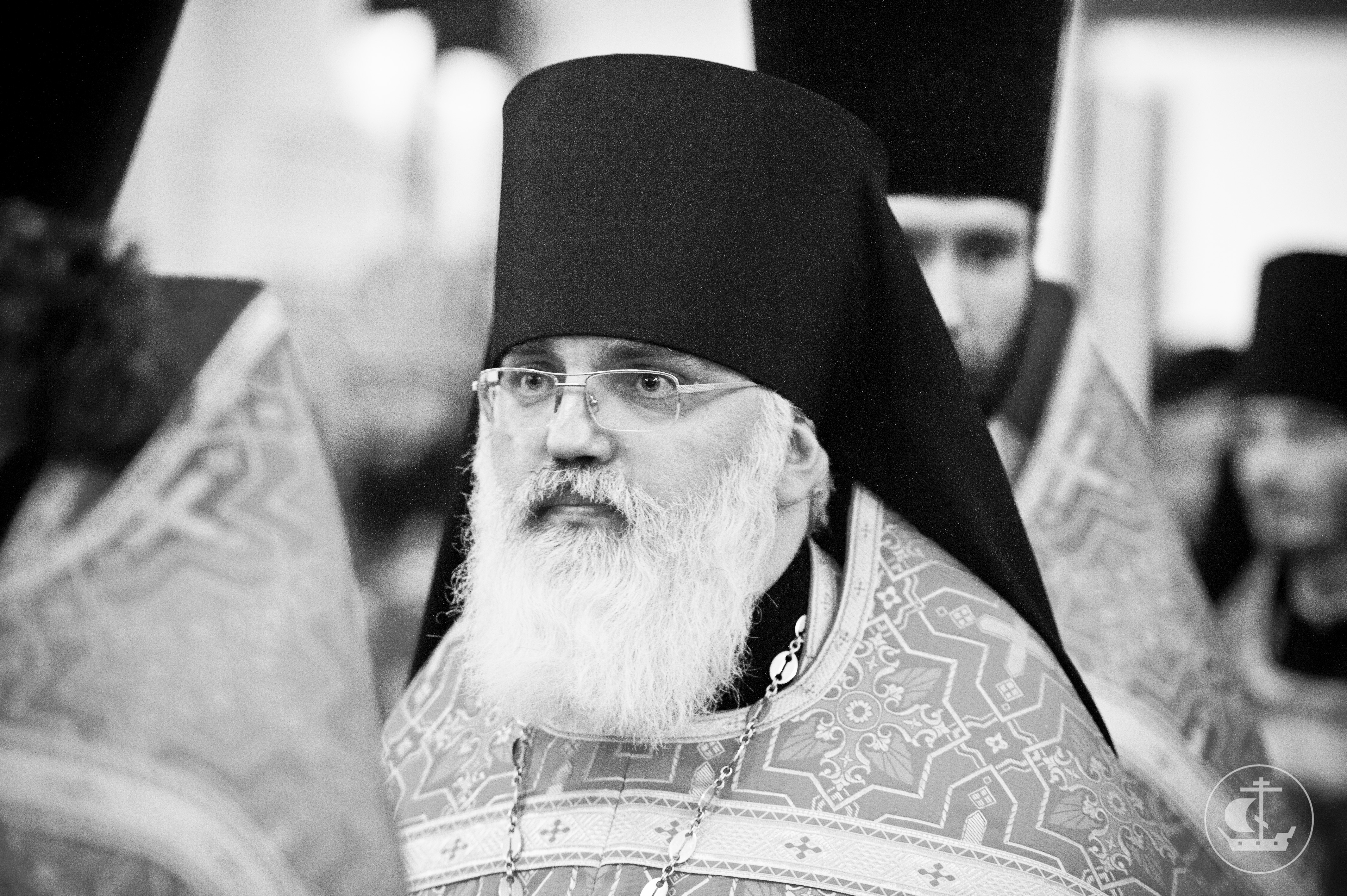 иеромонах Антоний (Простихин). Всенощное бдение накануне престольного праздника академического храма СПбПДА. 8 октября 2013